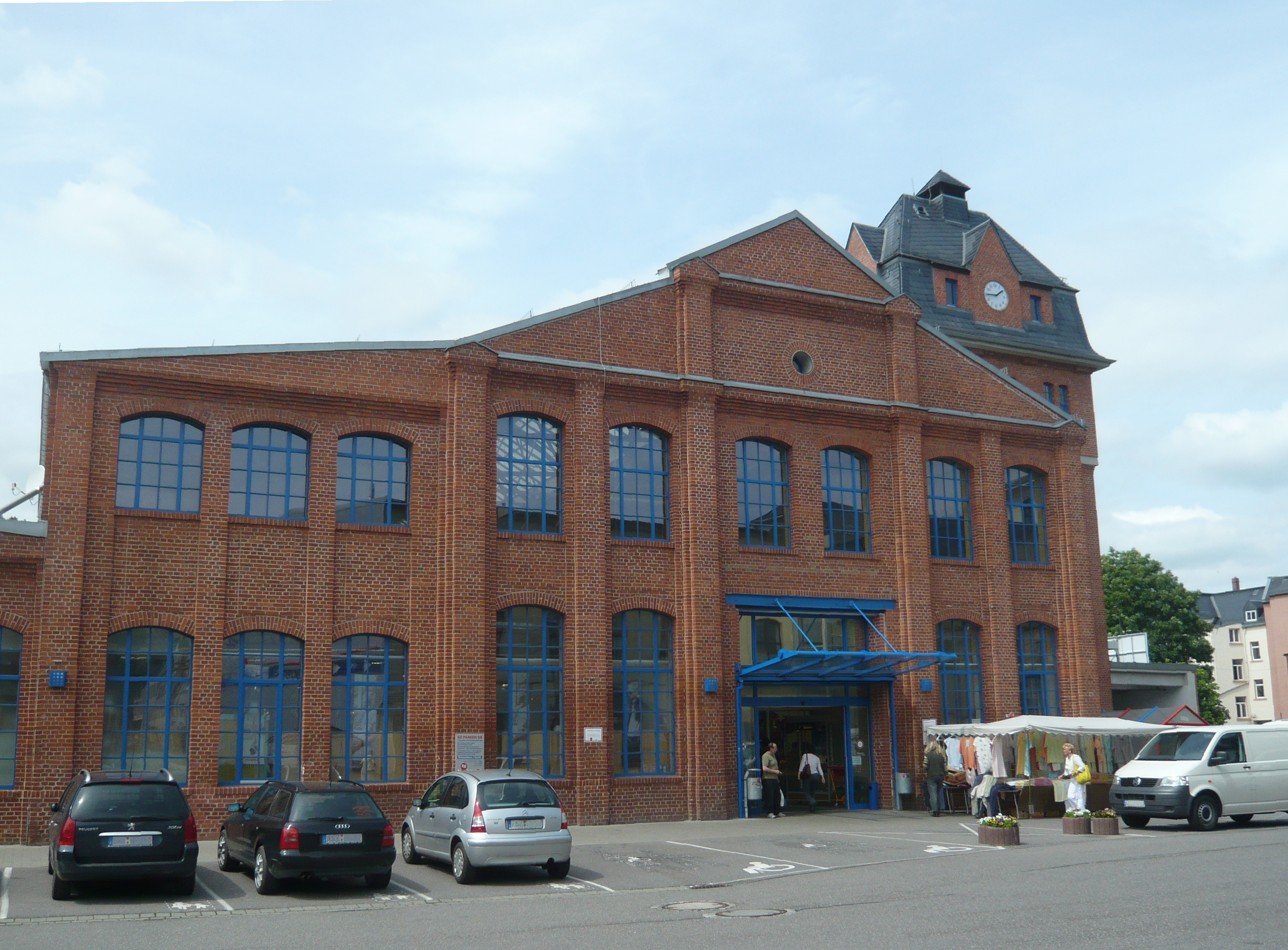 Stadt Aue, eh. Gessnersche Fabrikhalle